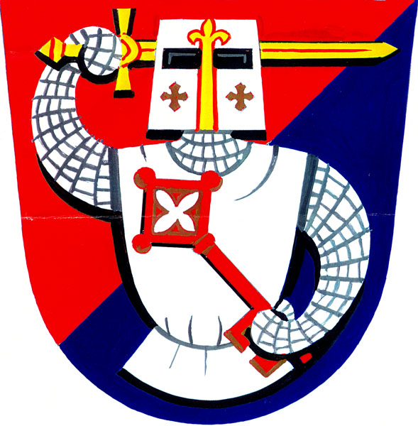 Znak obce Nezdenice